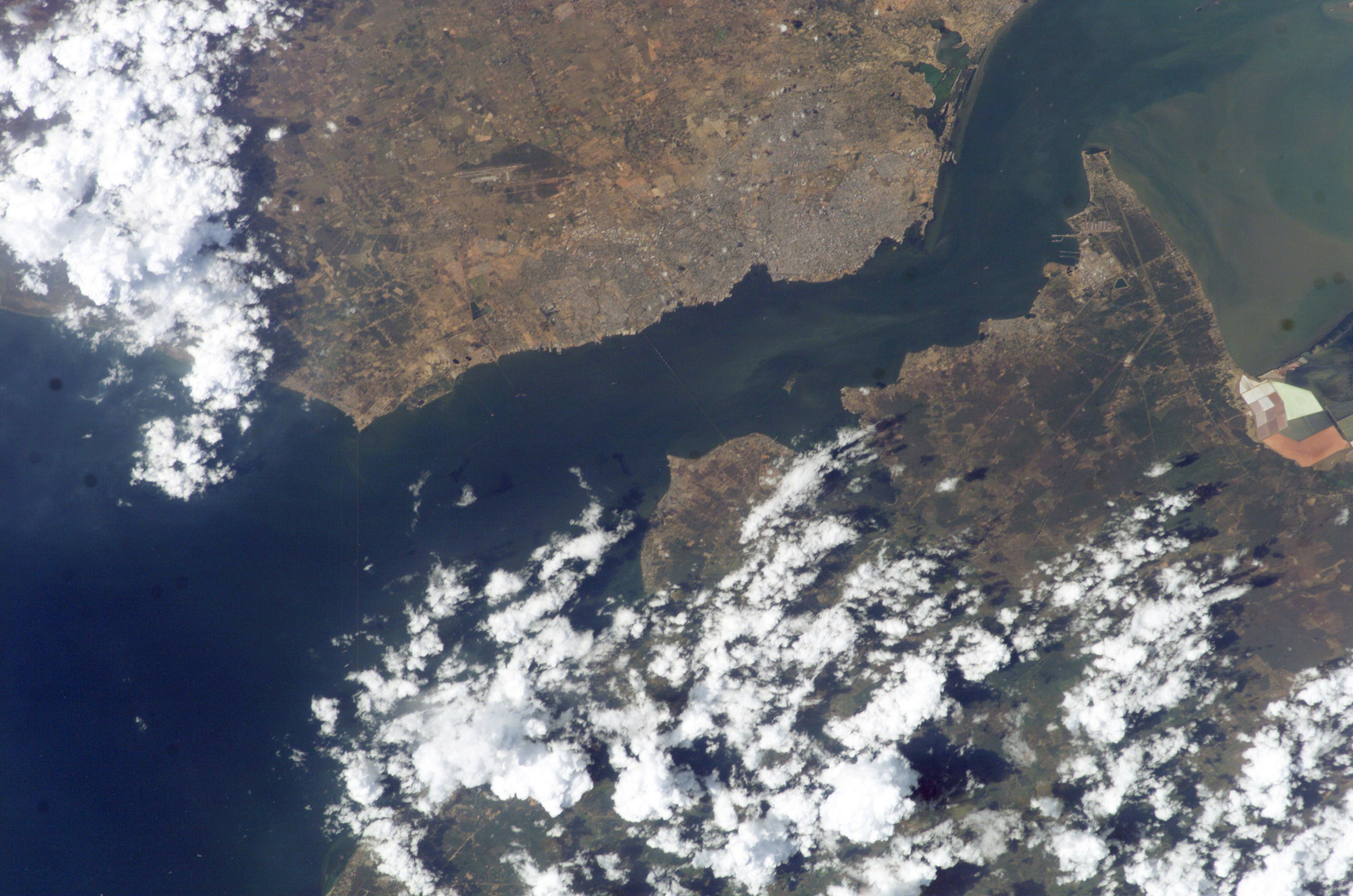 Vista satelital de Maracaibo, el Lago y la Costa Oriental Vista aérea de la ciudad de Maracaibo en Venezuela. Foto tomada por la NASA, Dominio público.